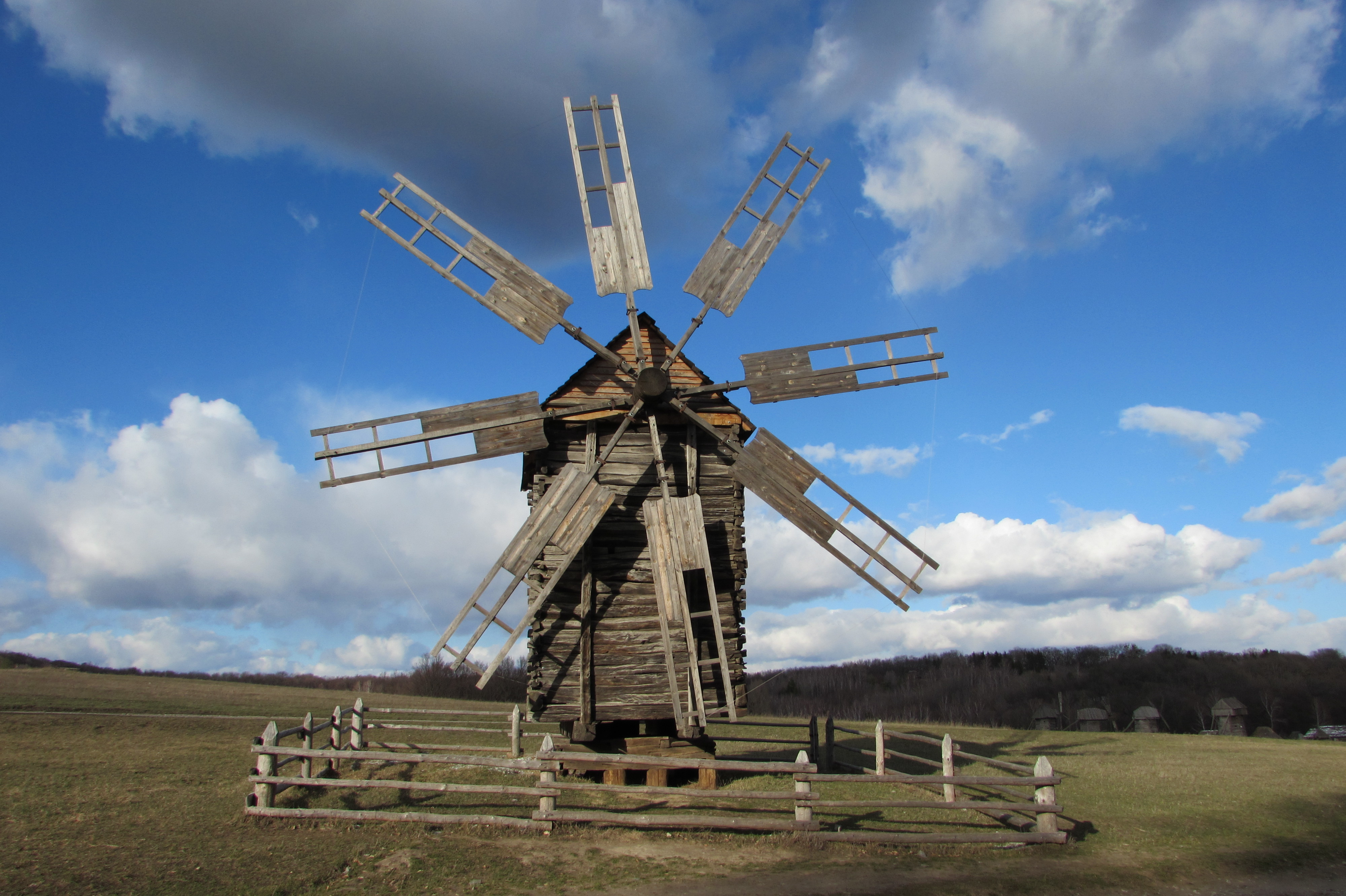 Вітряк із села Кудряве Охтирського району Сумської області, Київ, Пирогів